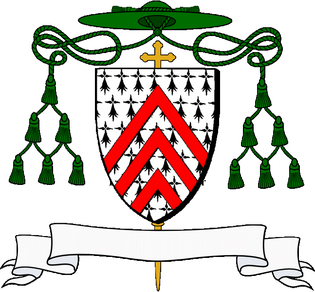 En erminoù e deir c'hebrenn en gwad